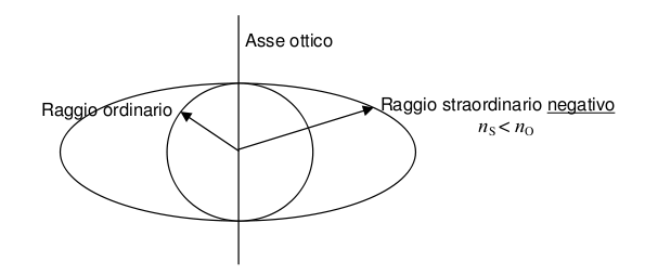 Propagazione dei fronti d'onda in un cristallo a birifrangenza negativa